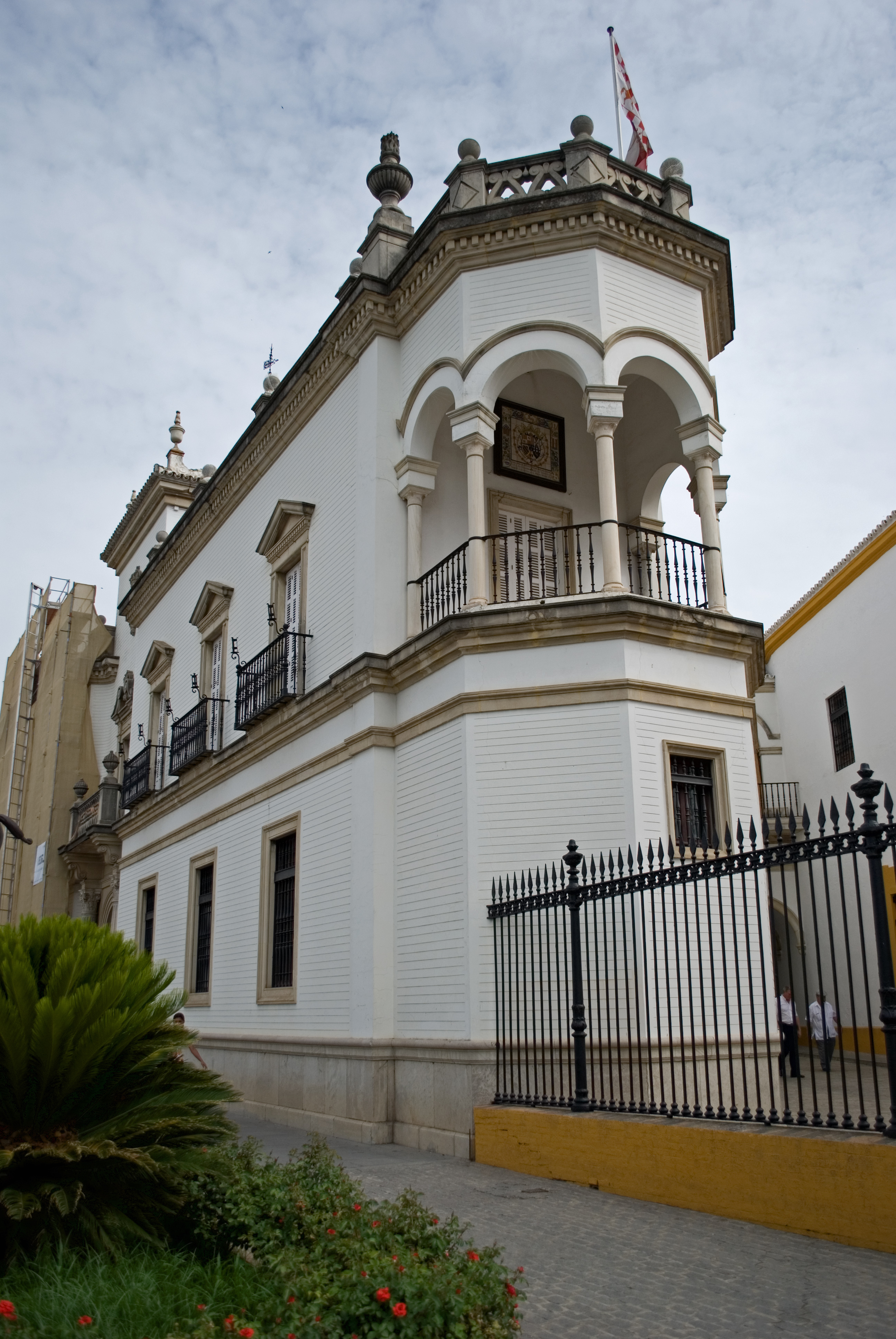 Casa de la Real Maestranza de Caballería de Sevilla, Paseo de Colón en Sevilla. Arquitecto Aníbal González (1927-1930)